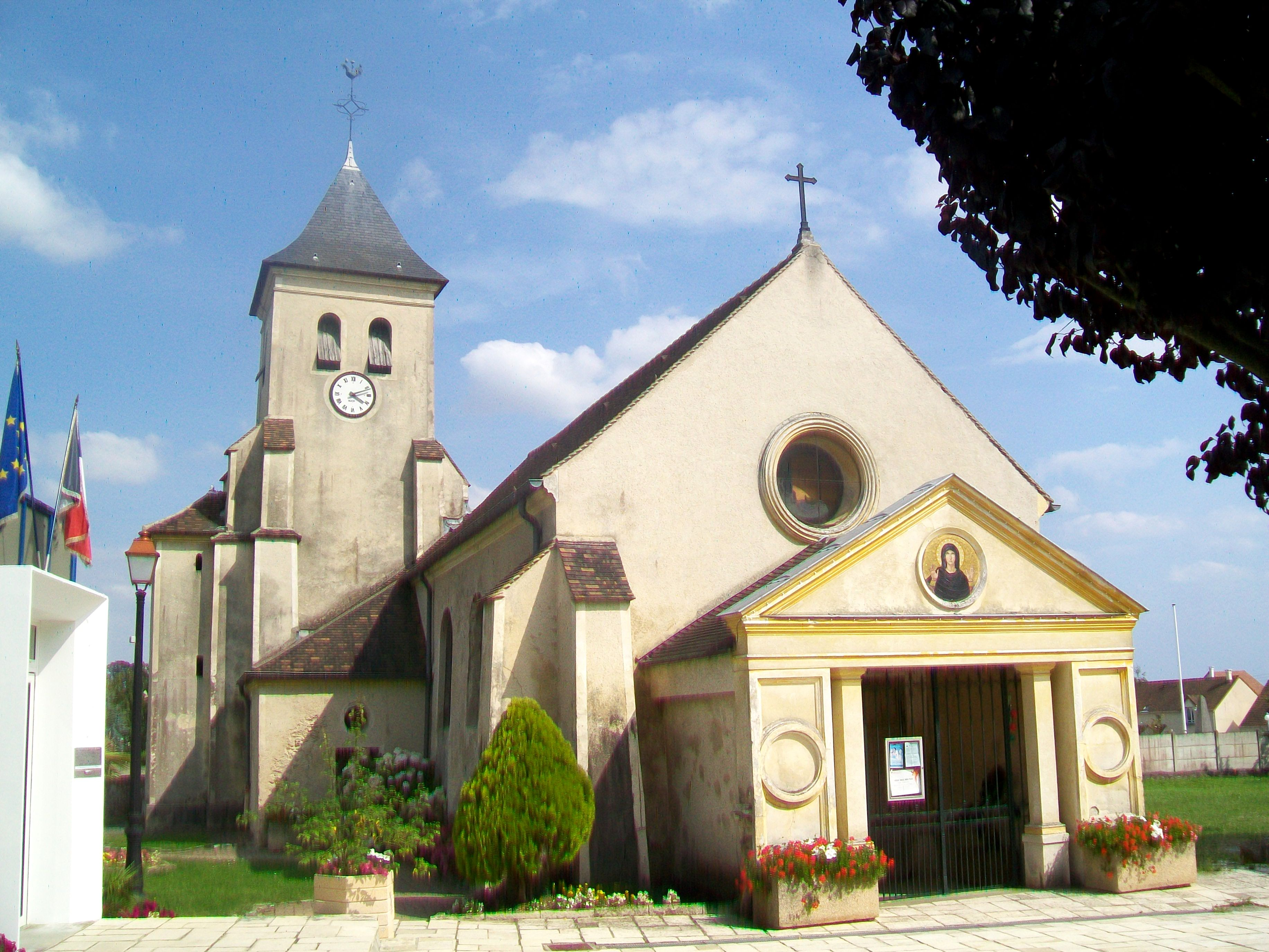 L'église Saint-Martin, façade occidentale et portail.